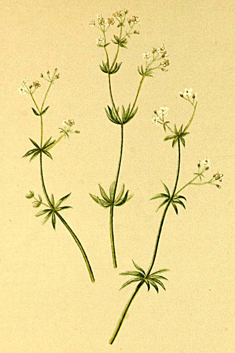 Galium austriacum (Galium pusillum)